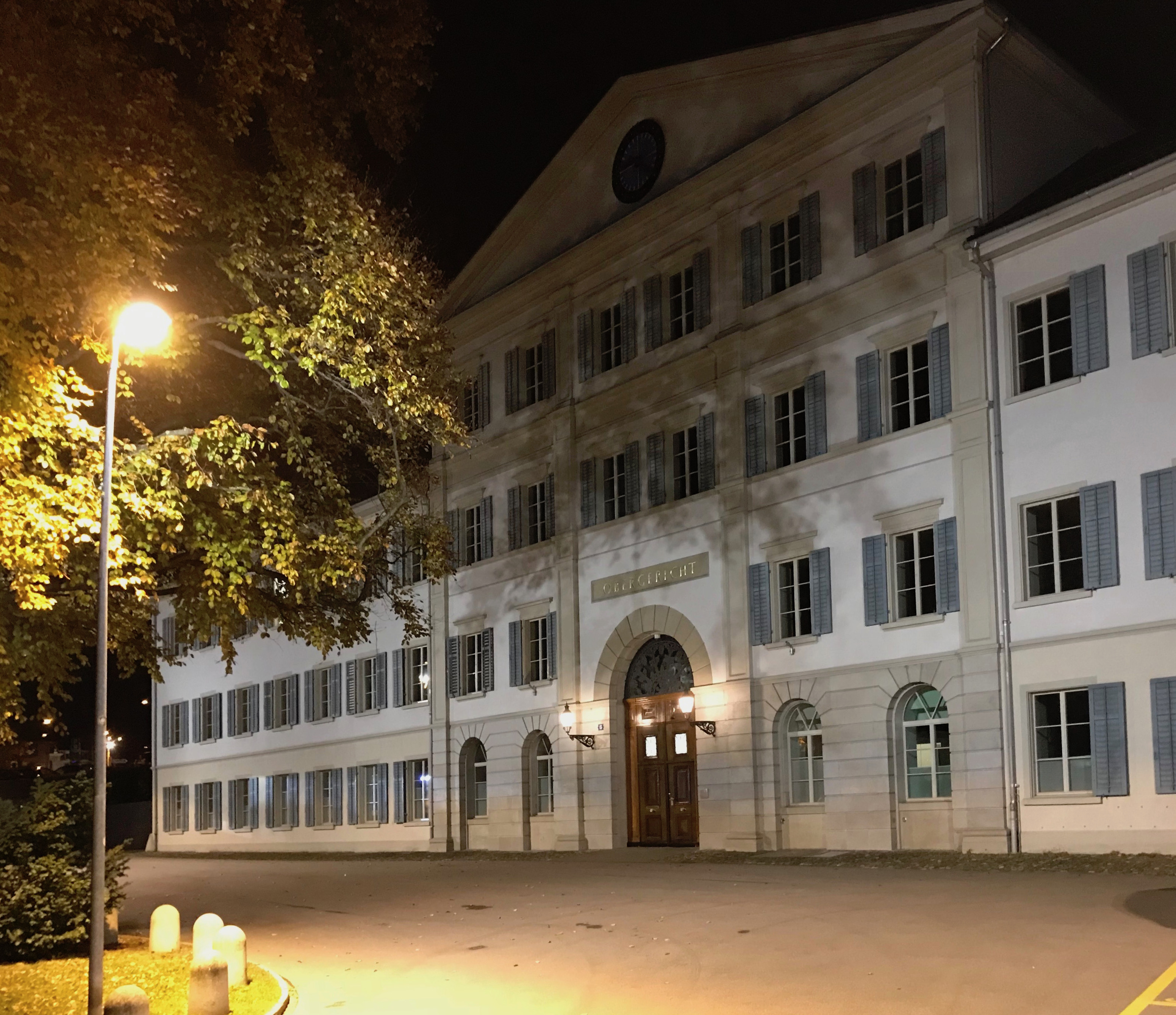 Zürcher Obergericht von Osten